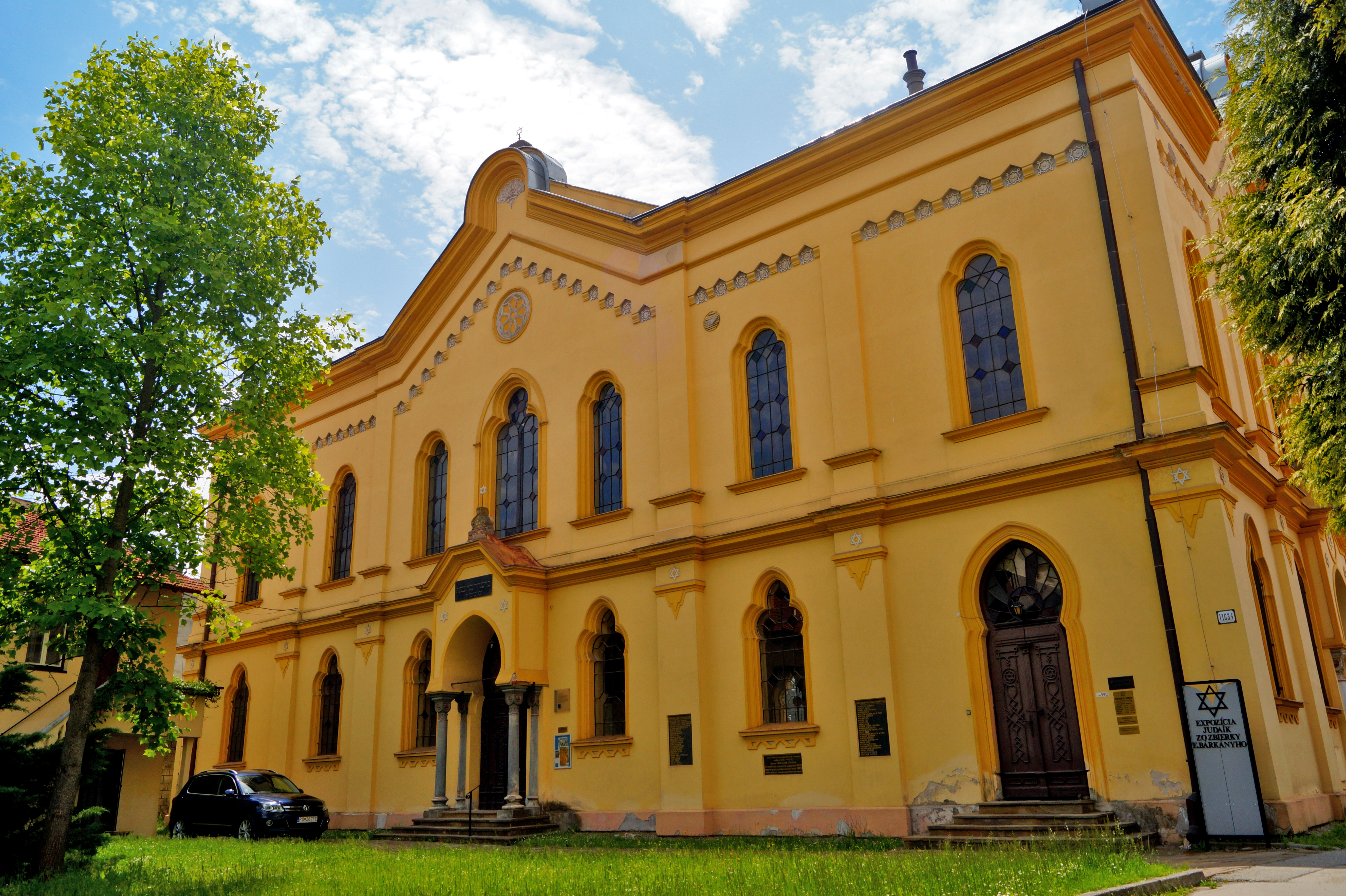 Ortodoxná synagóga, Prešov - Staré mesto